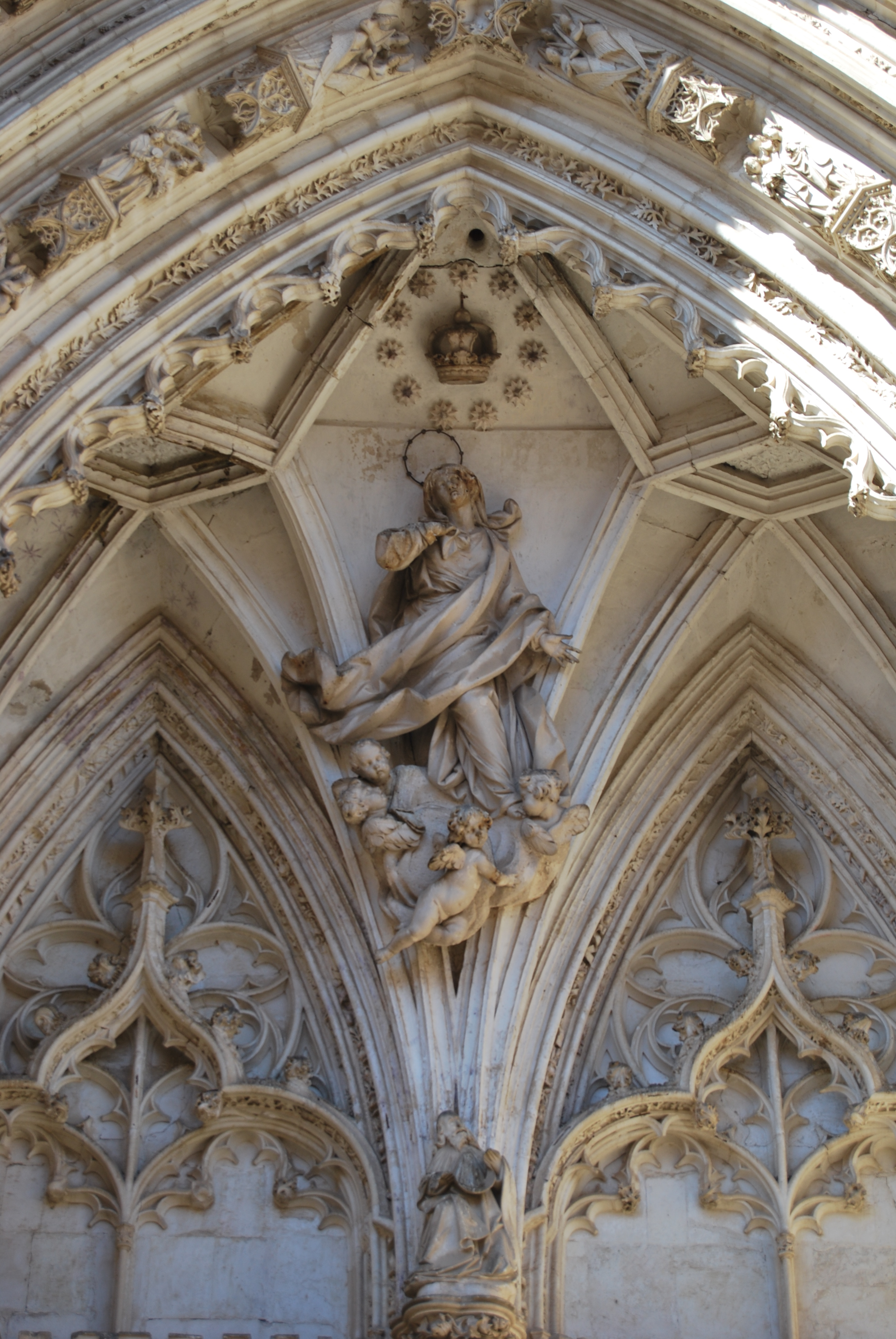 Detalle de la Asuncion de la Virgen en la parte final del testero de la puerta, tras las arquivoltas